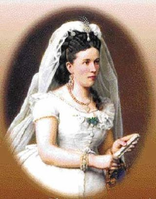 Retrato de la Primera Dama de Bolivia, Lindaura Anzoategui Campero con su traje de bodas, al momento de contraer enlace con el General Narciso Campero Leyes.